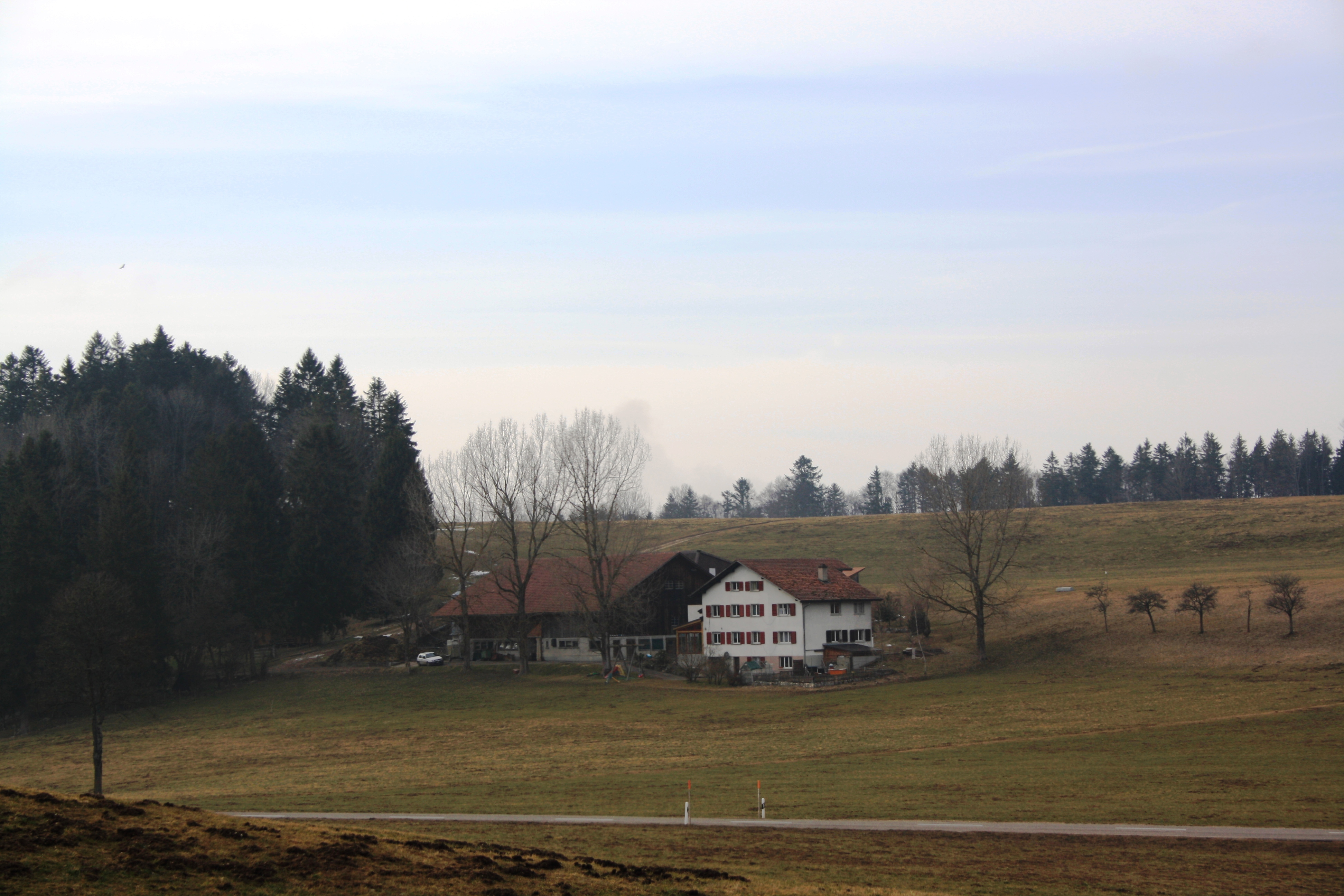 Mont-Tramelan